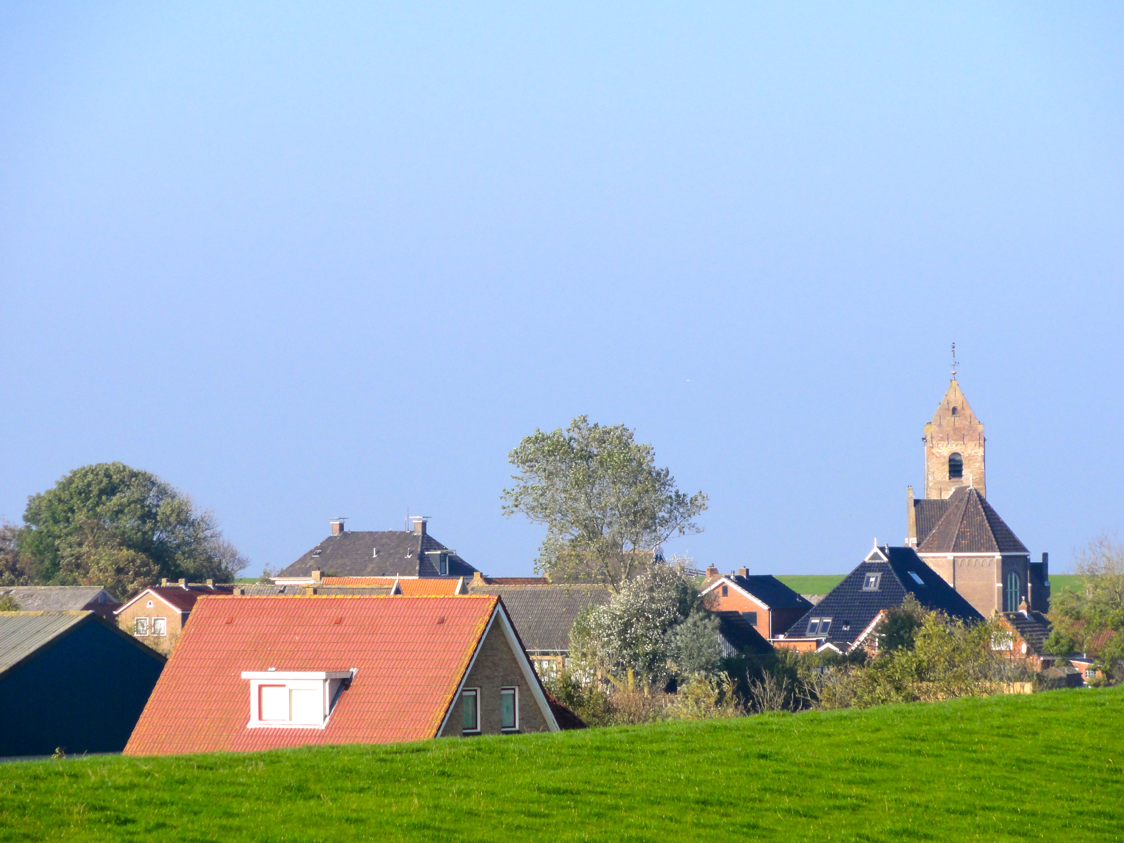 Zicht op Wierum vanaf de Waddenzeedijk